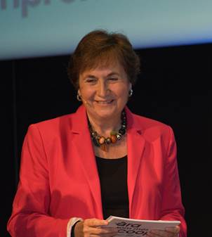 Maravillas rojo, Secretaria General CIDEU